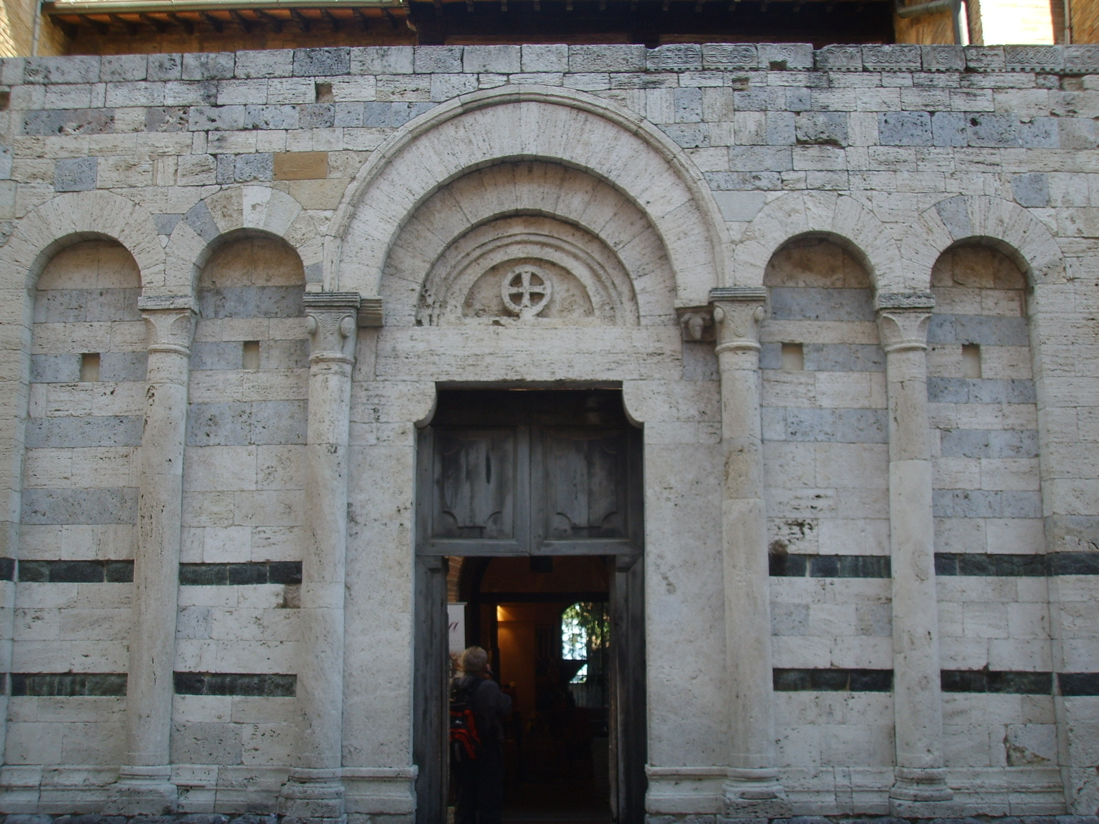 San gimignano ex chiesa di san francesco